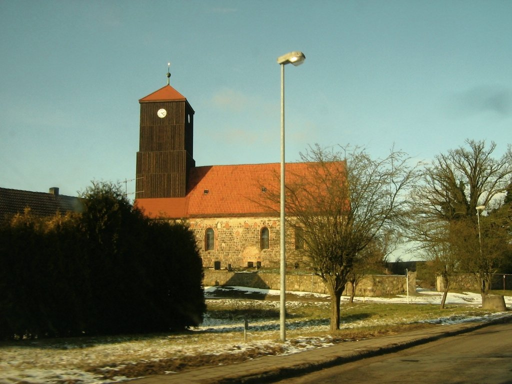 Kirche in Klaushagen (Gemeinde Boitzenburger Land, Landkreis Uckermark, Brandenburg).